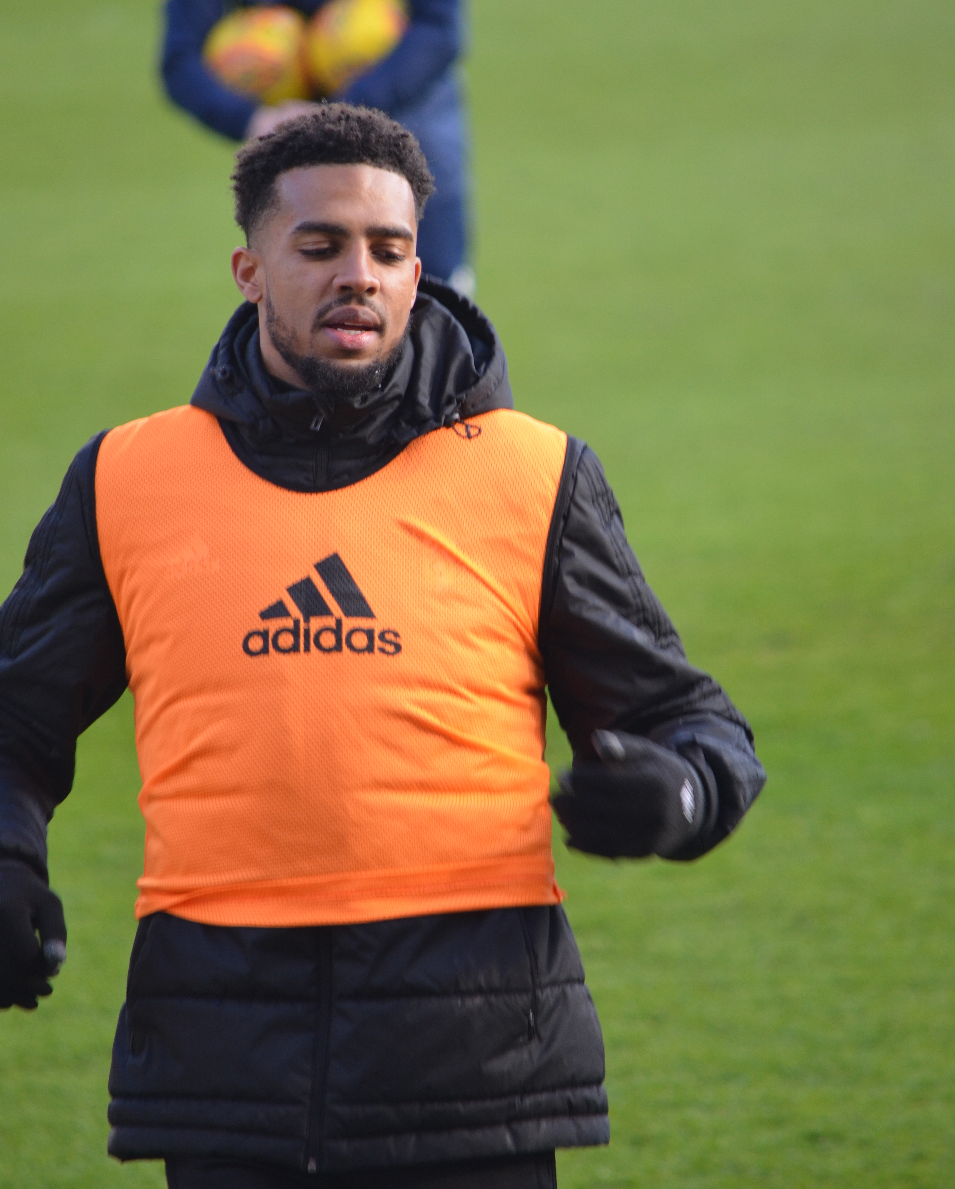 Cyrus Christie, Fulham Fc